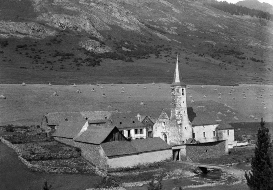 Imatge